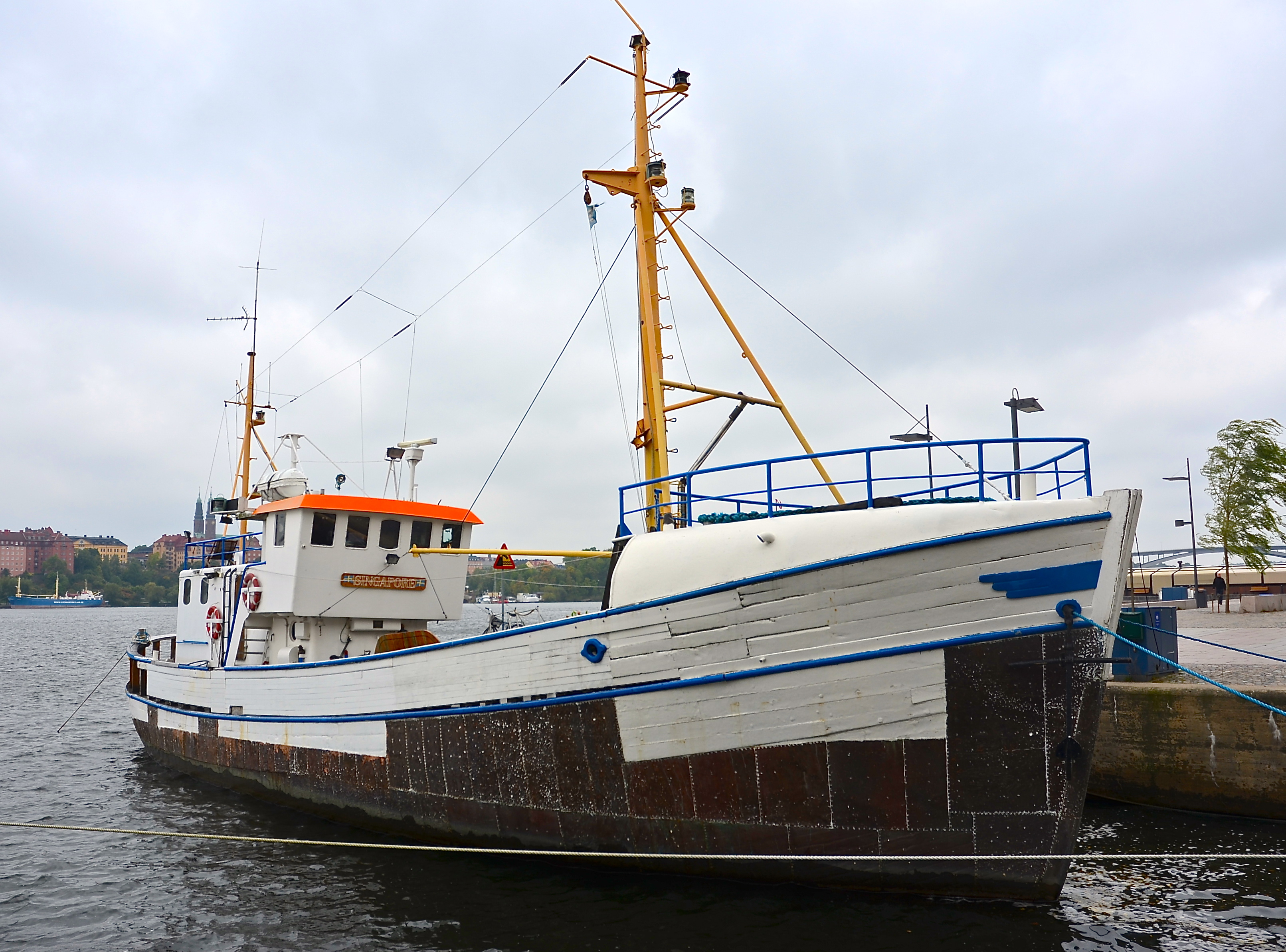 Fiskebåten Singapore vid kaj på Norrmälarstrand i Stockholm This is an image of the protected Swedish ship Fiskebåten Singapore, with call sign SEXO .